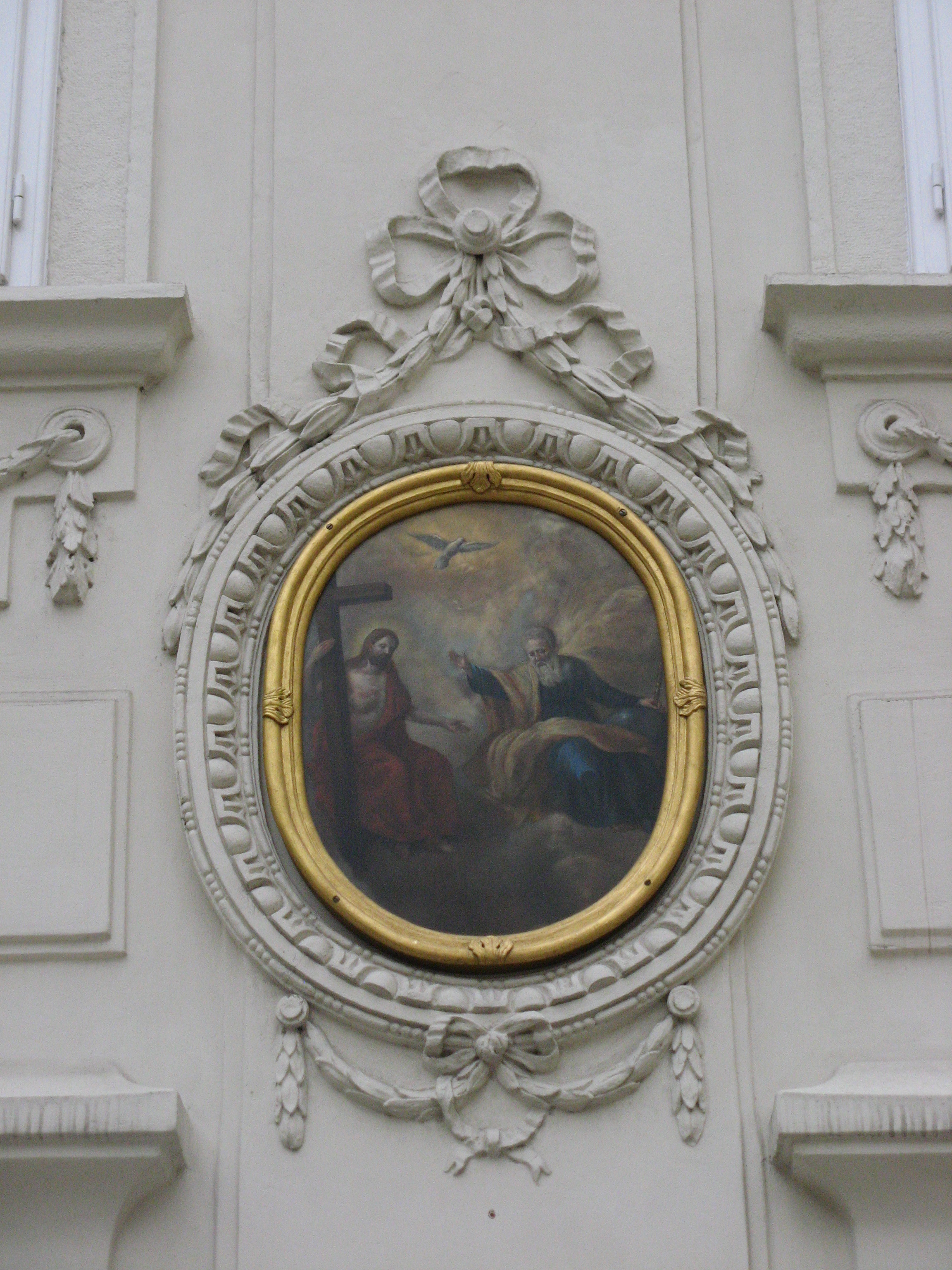 Bild der Hl. Dreifaltigkeit, Dreimäderlhaus (3. Viertel 18. Jh.), Schreyvogelgasse 10, Wien-Innere Stadt